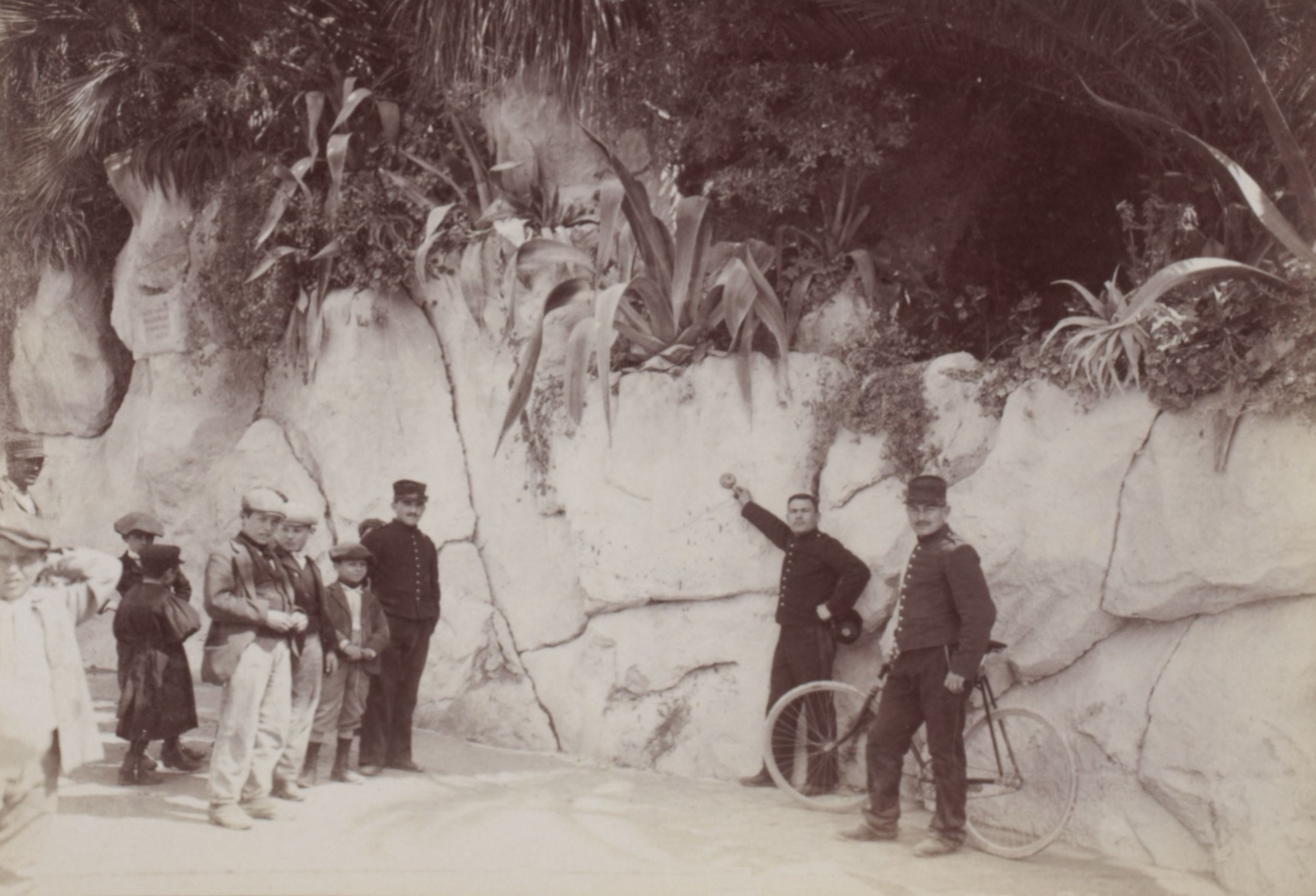 [Collection Jules Beau. Photographie sportive] : T. 20. AnnÃ©e 1903 / Jules Beau : F. 39. [Quinzaine de Nice, Concours de tourisme, 1er avril 1903]